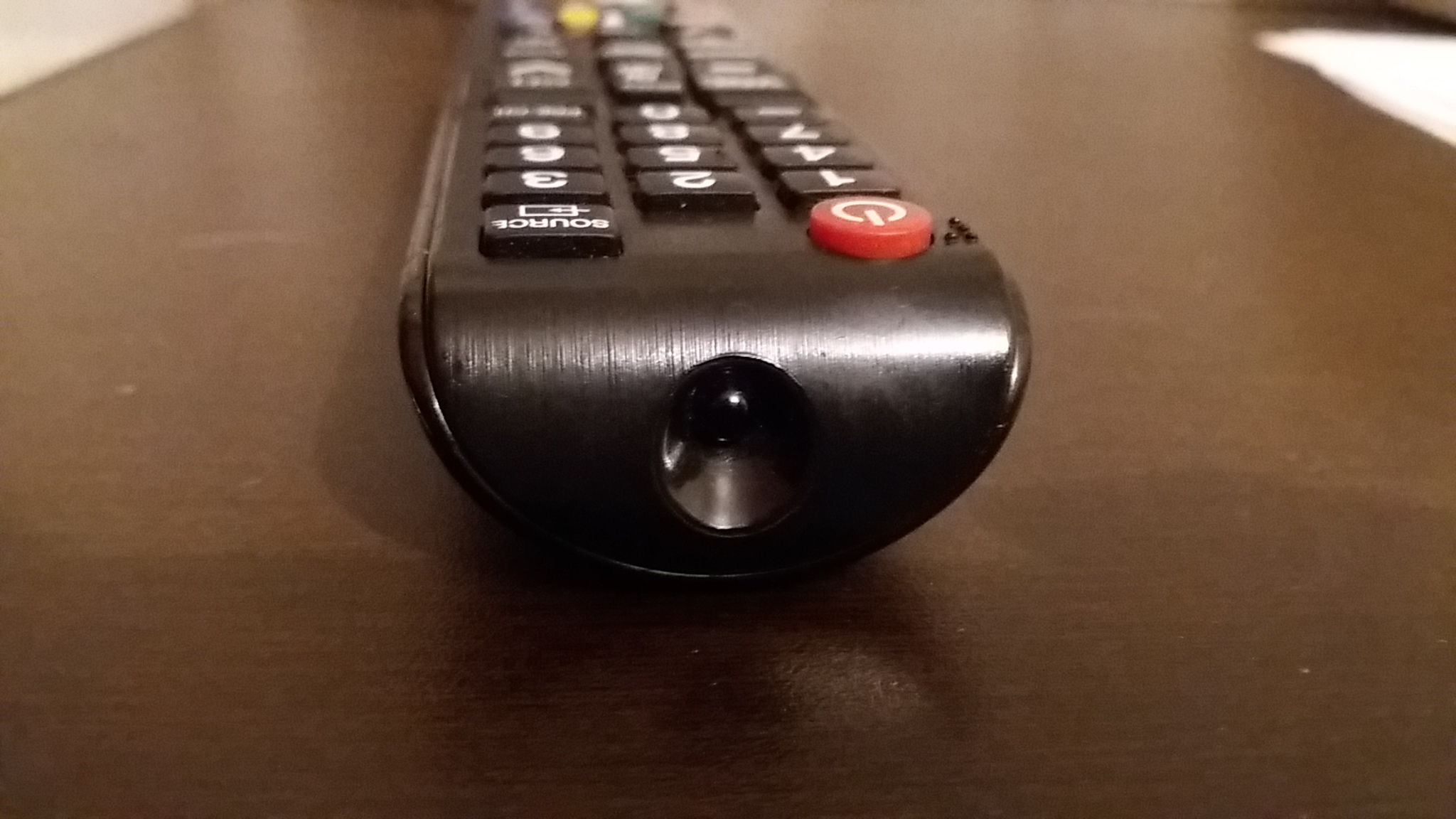 El transmisor de luz infrarroja de un control remoto Samsung estándar